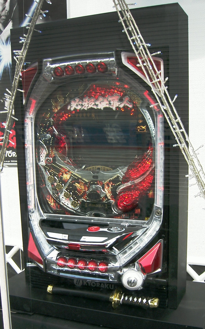 KYORAKU_CR-Pachinko_hissatsu' Japan